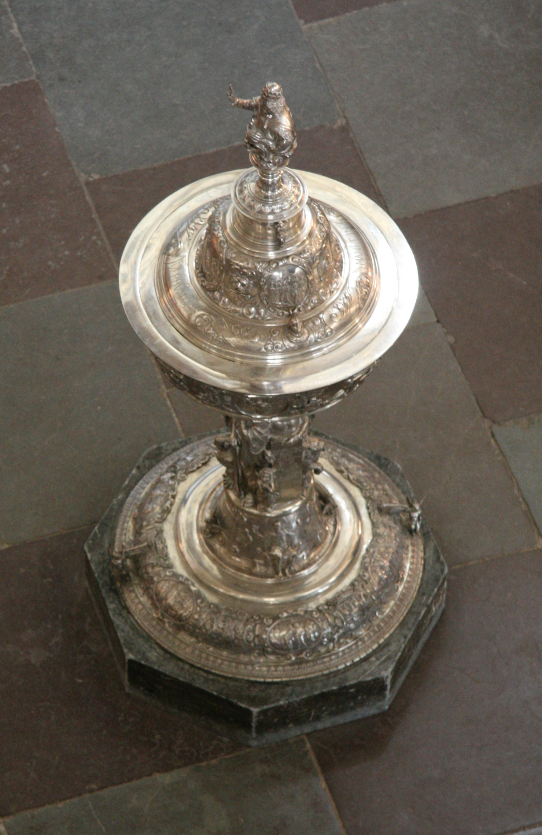 Frederiksborg Slotkirke, Hillerød, Denmark. Baptismal font